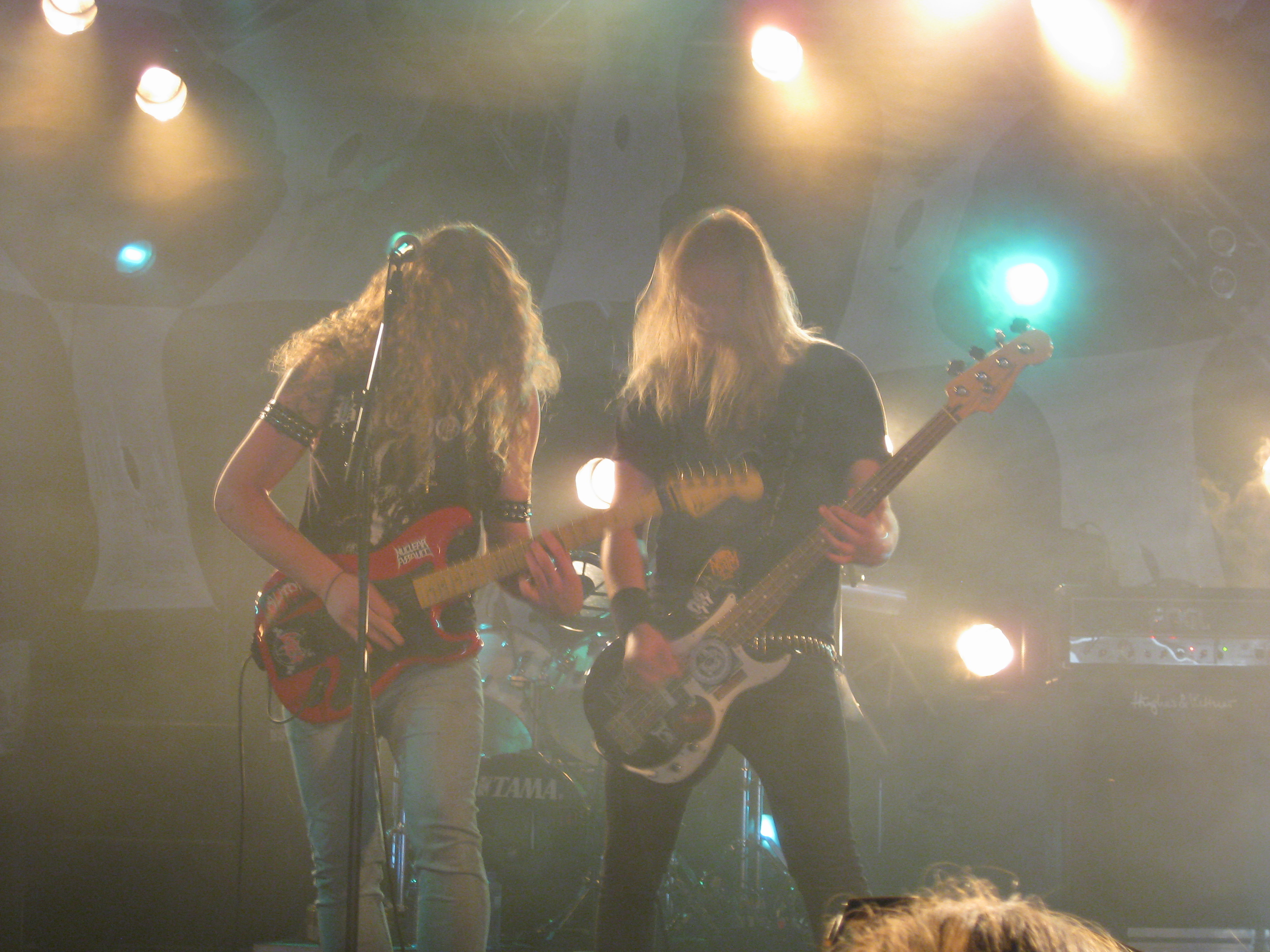 Nekromantheon live at Øyafestivalen (2012).